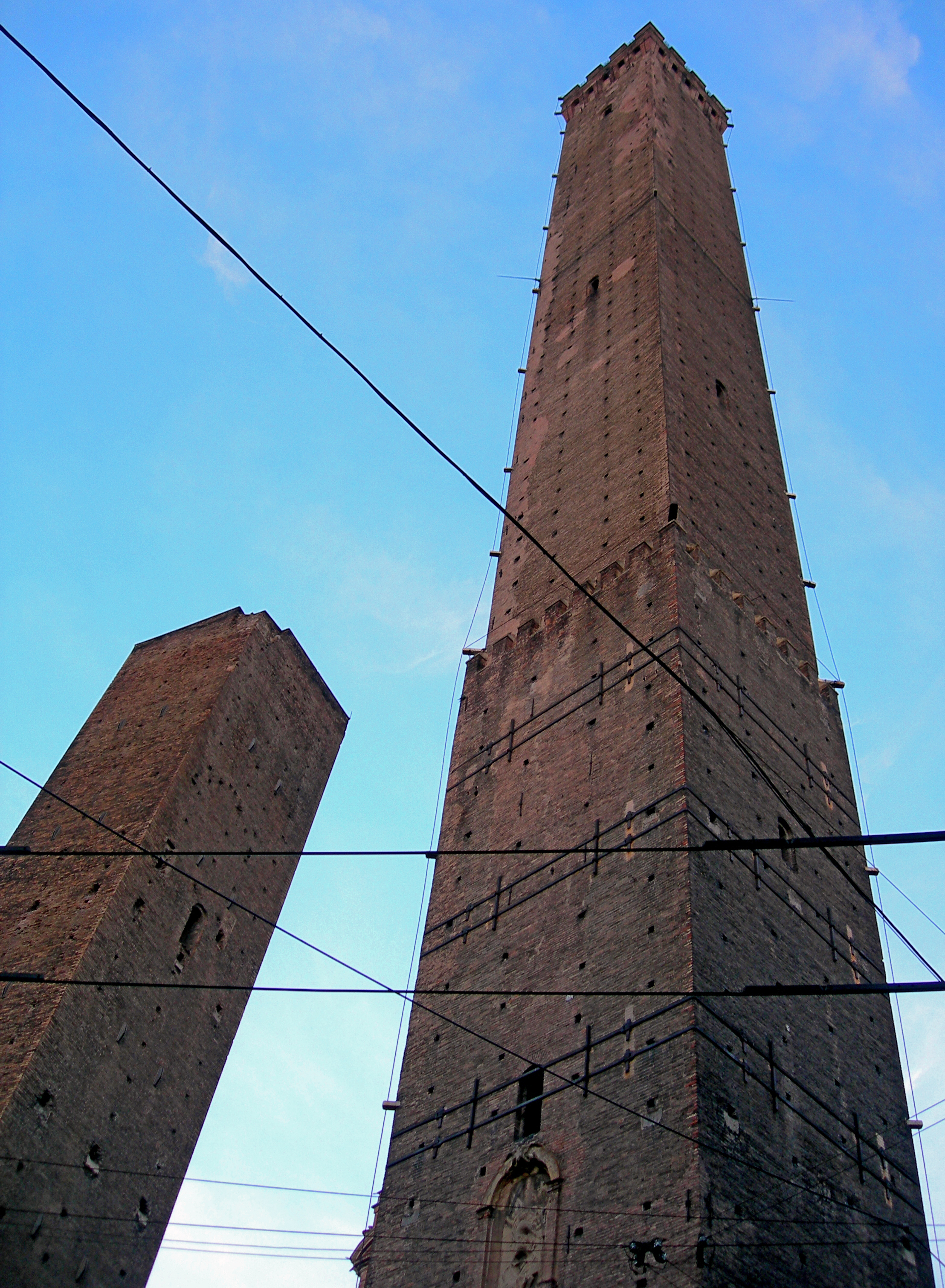 Particolare delle Due torri di Bologna